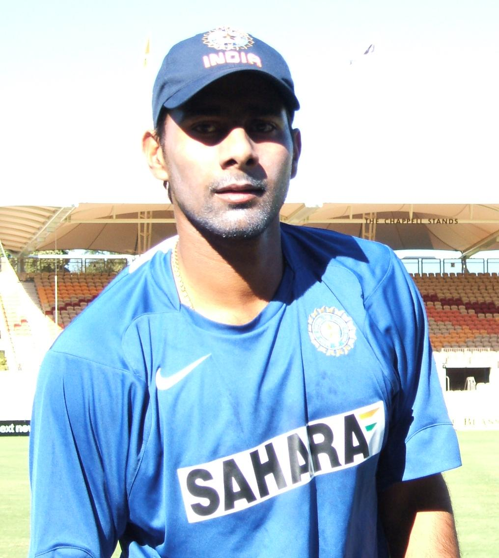 Praveen Kumar at Adelaide Oval